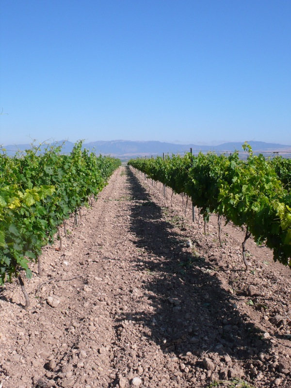 Tempranillo blanco vines